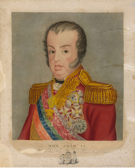 retrato de dom joão vi